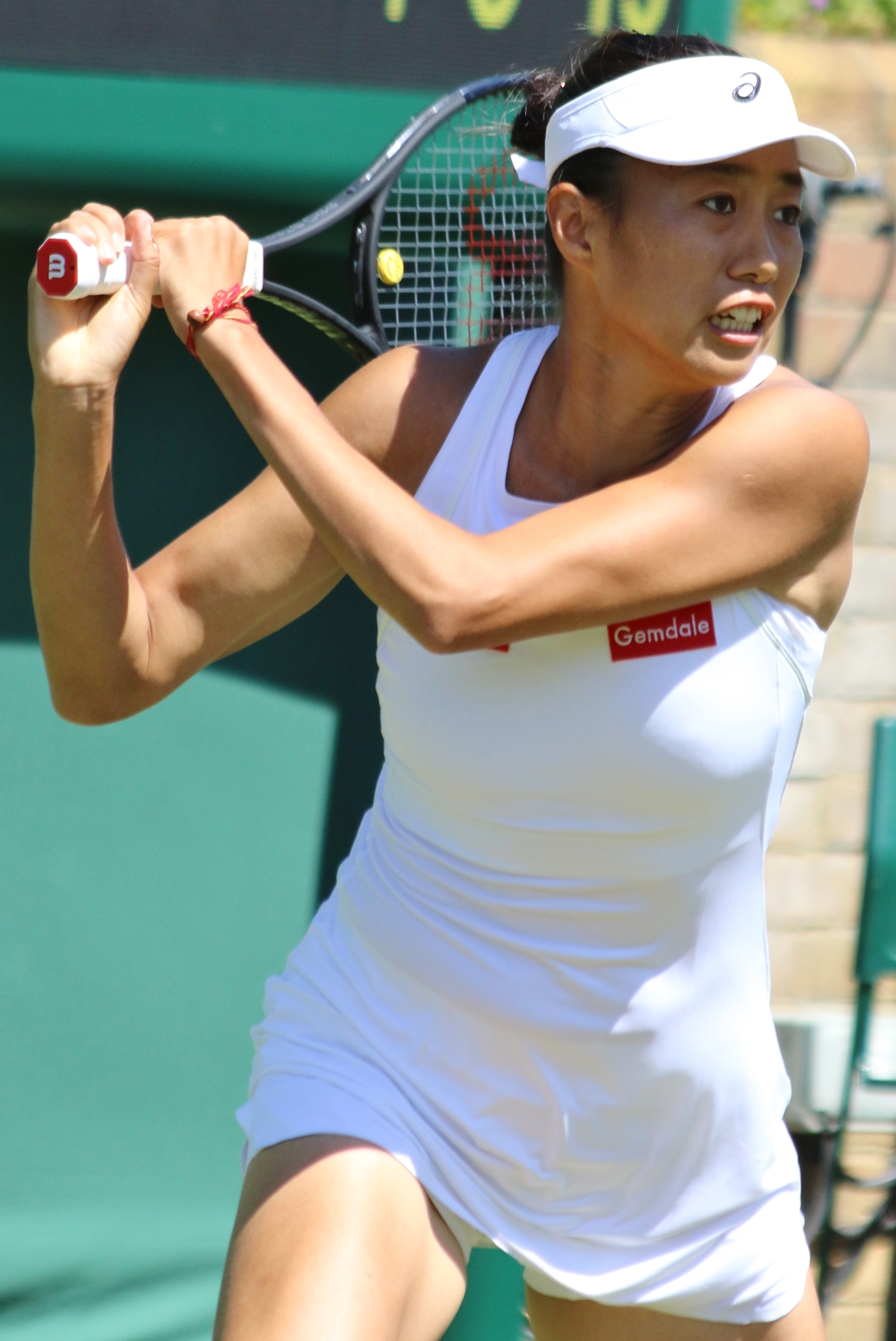 Zhang WM18 (6)